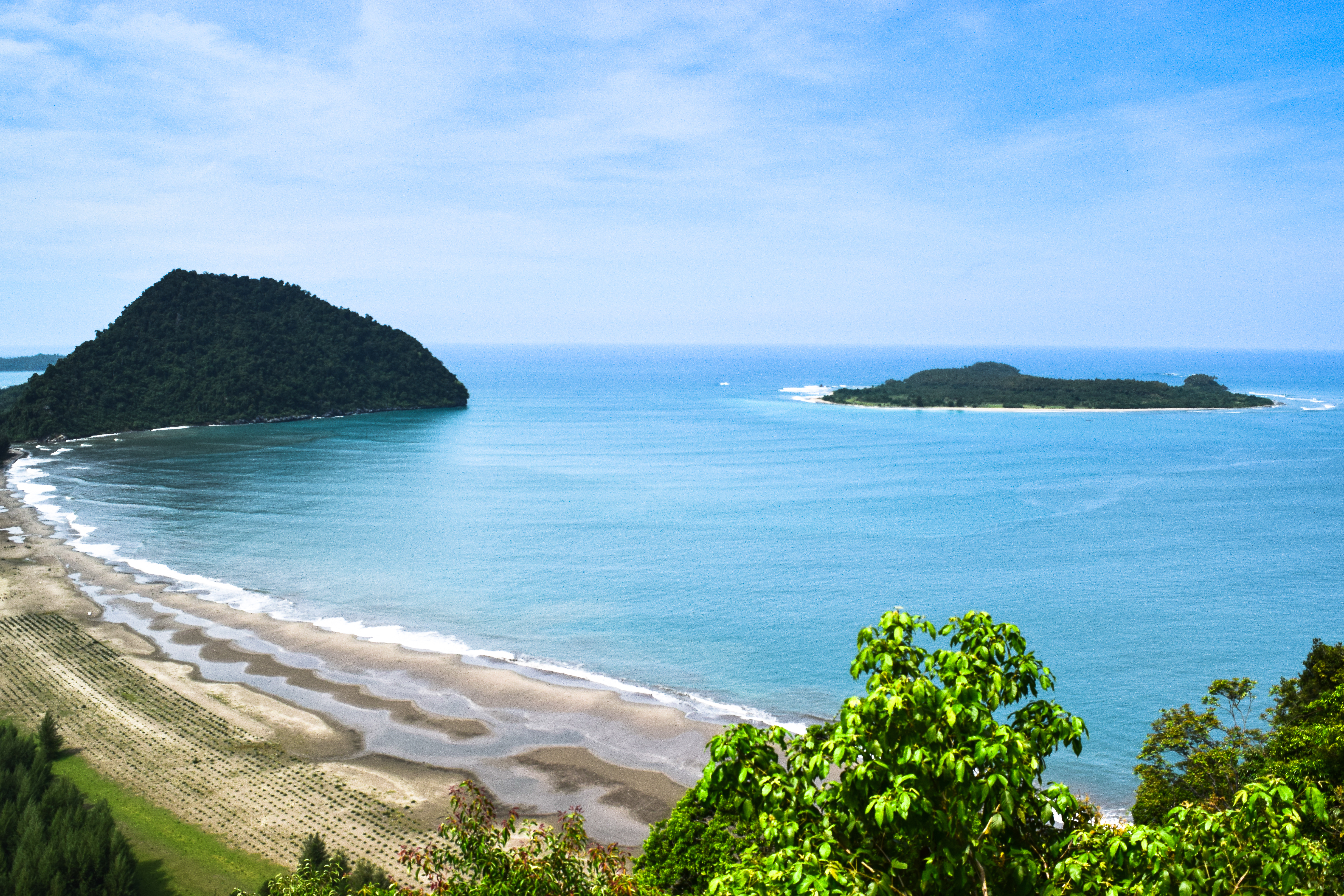 Awalnya hanya penasaran diajak teman tapi view dari per atapan "istilah tempat lihat view sambil minum es kelapa" orang medan ini memang tidak ada duanya. Bahkan ada jam tertentu kita bisa didatangi siamang yang sedang mencari makan disini. Sayang tidak sempat menikmati sunset disini dikarenakan harus menyeberang di lamnoe aceh jaya ini